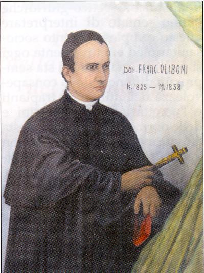 Don Francesco Oliboni, Mazza's catholic missionary